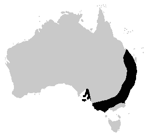 Carte de distribution de Pseudophryne bibronii